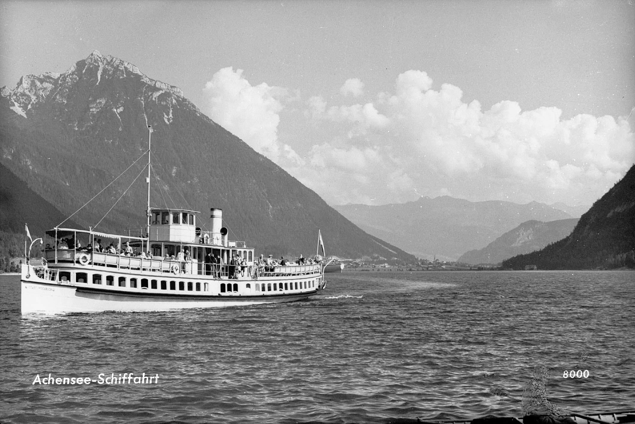 Achensee - Schiffahrt